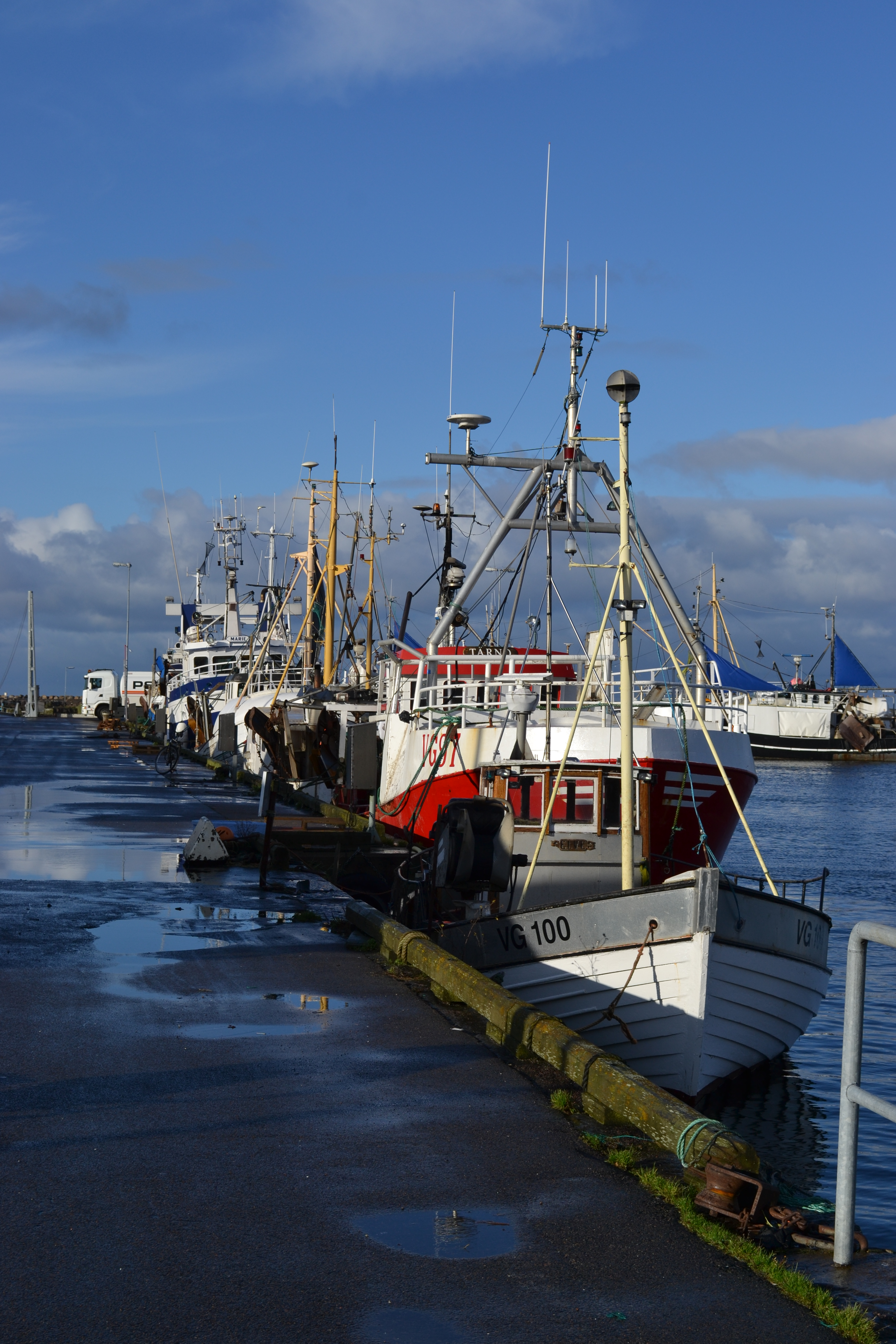 Träslövsläge, Varbergs kommun.